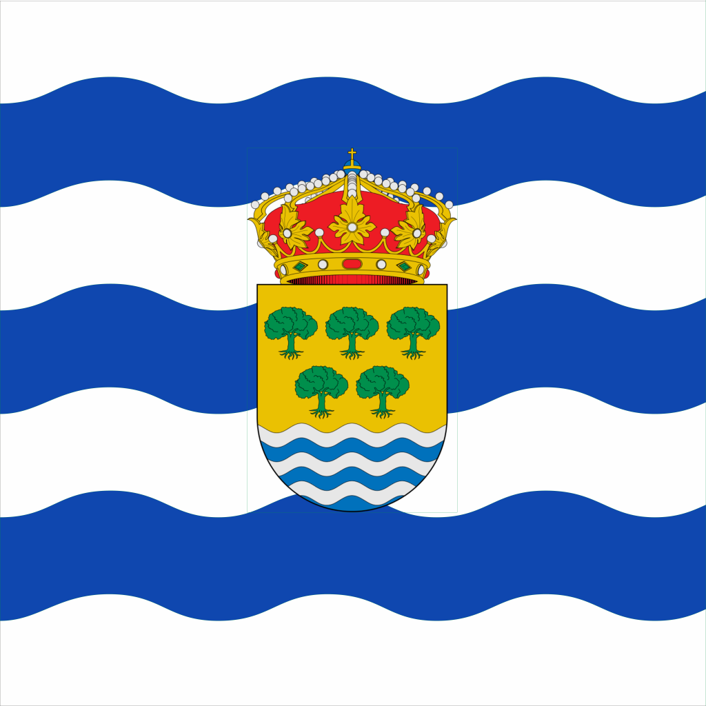 Paño cuadrado 1:1 sobre fondo blanco tres franjas onduladas de 1/5 de ancho, sobre todo y centrado, el escudo timbrado de la villa.